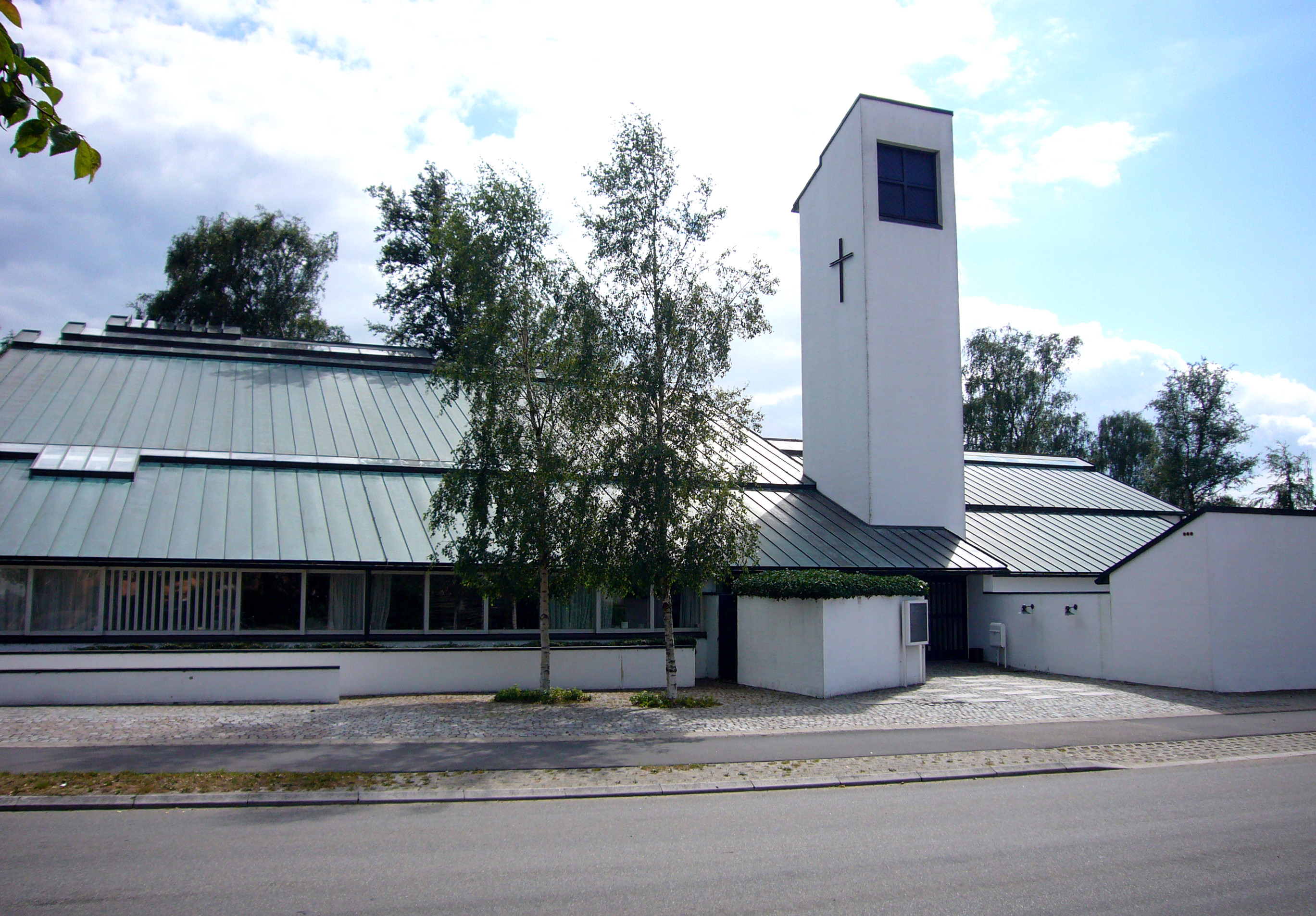 Solrød Strandkirke, Roskilde County, Denmark.